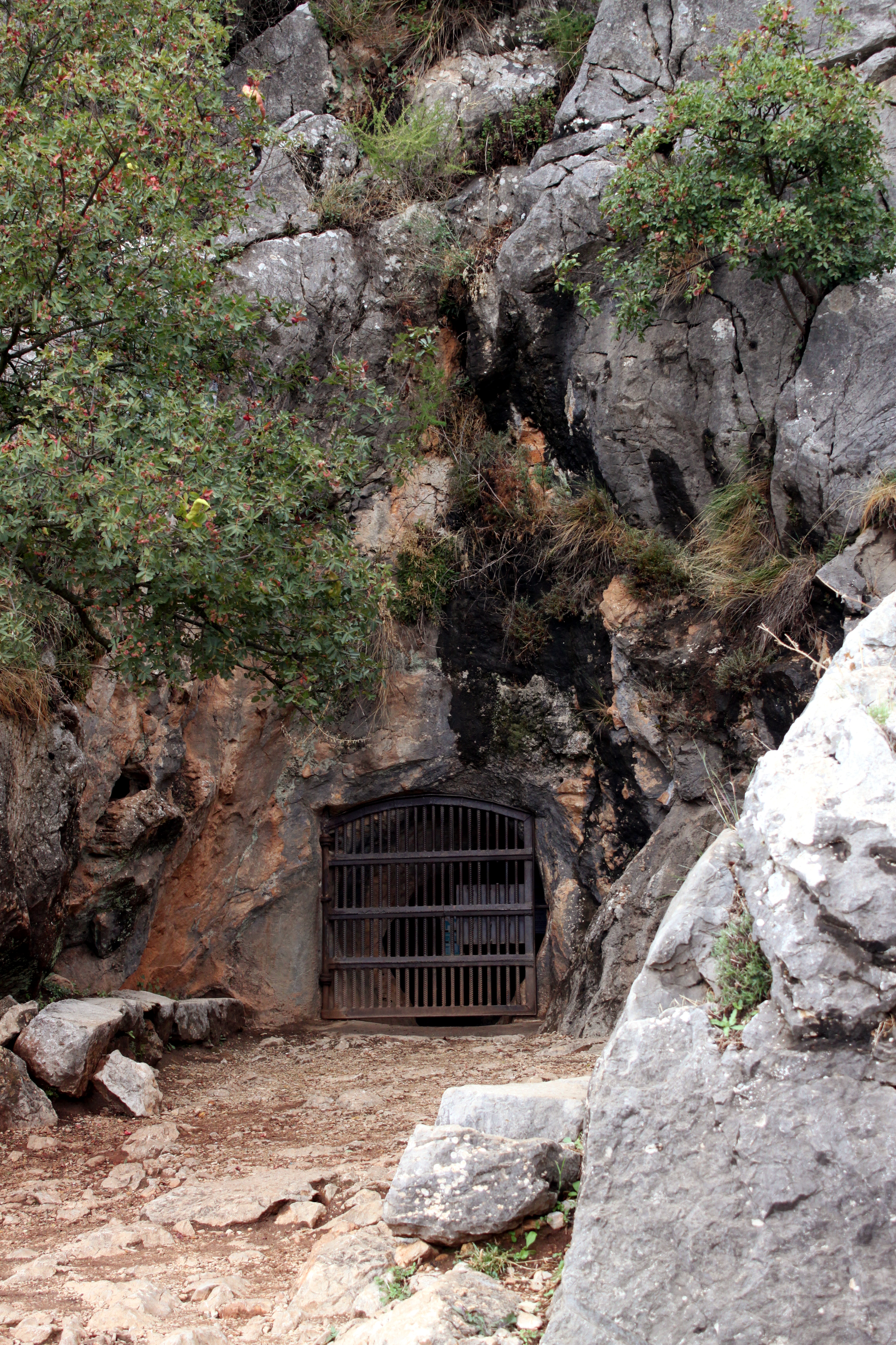 Entrada de la cueva de la Pileta, Benaoján, provincia de Málaga, Andalucía